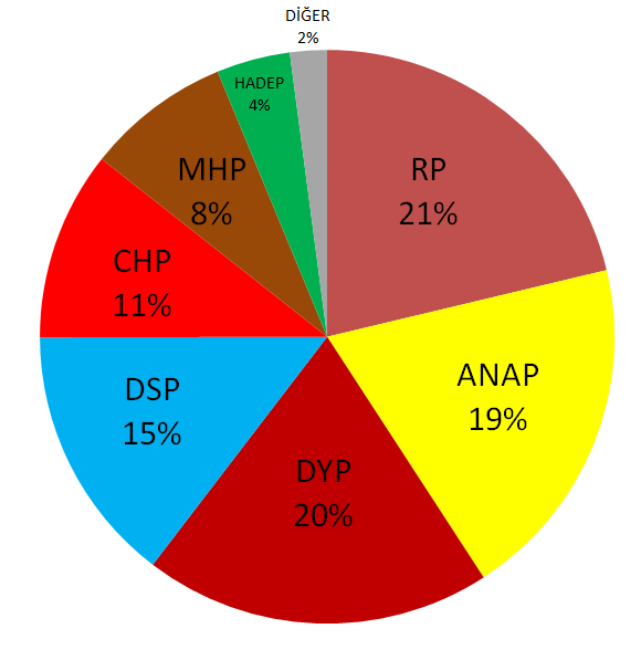 1995 Türkiye Genel Seçimleri'nin pasta grafiği.